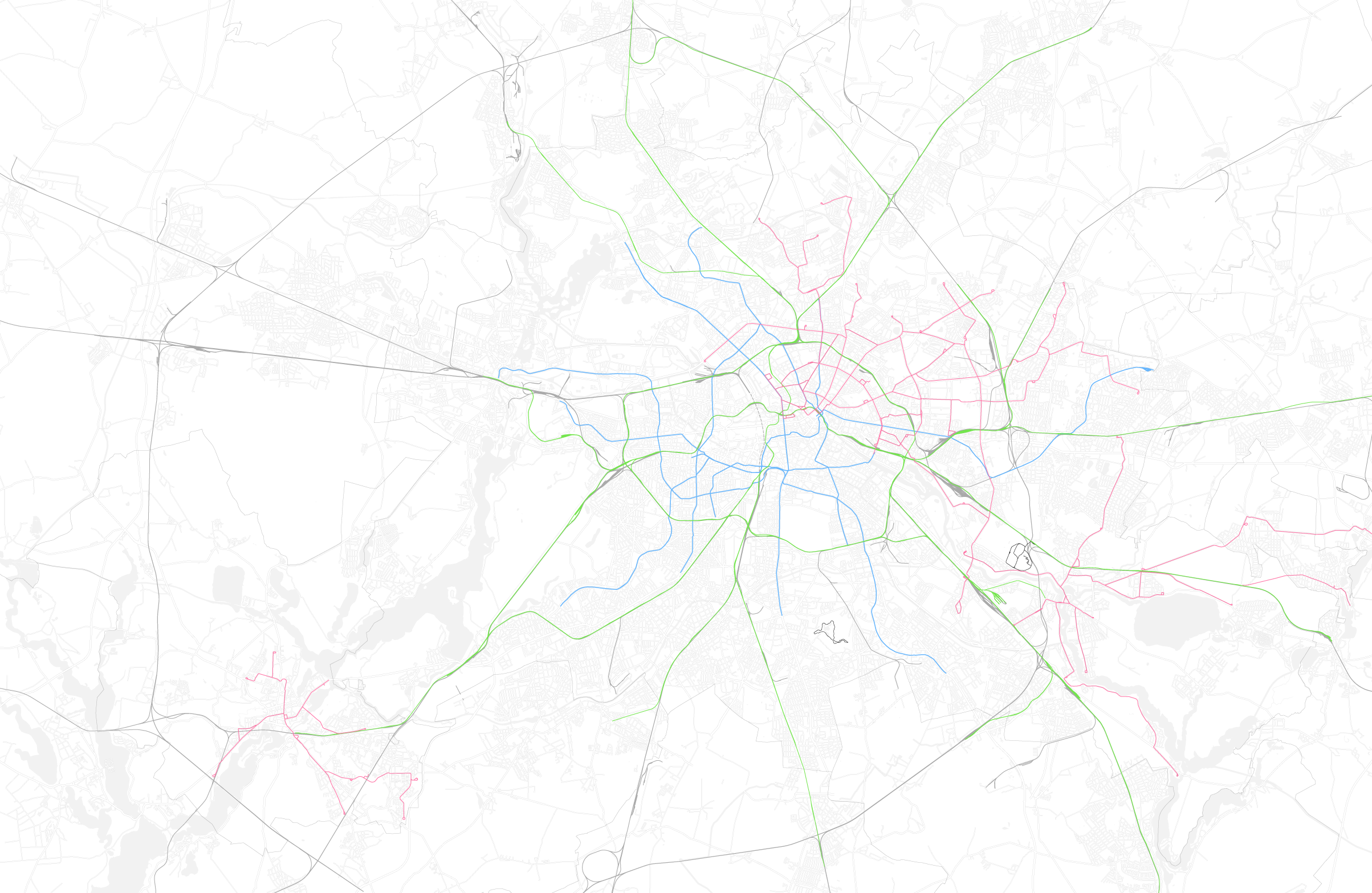 ÖPNV in der Region Berlin - Basiskarte für Weiterbearbeitungen